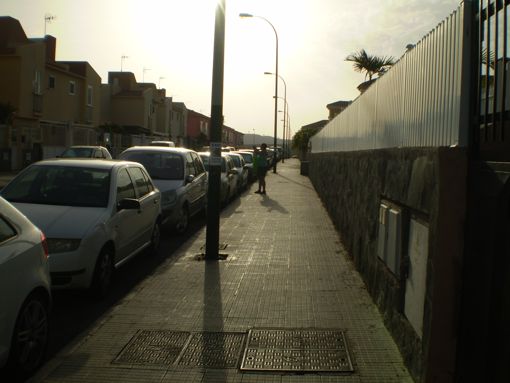 Sonneland, Maspalomas, Las Palmas, Spain